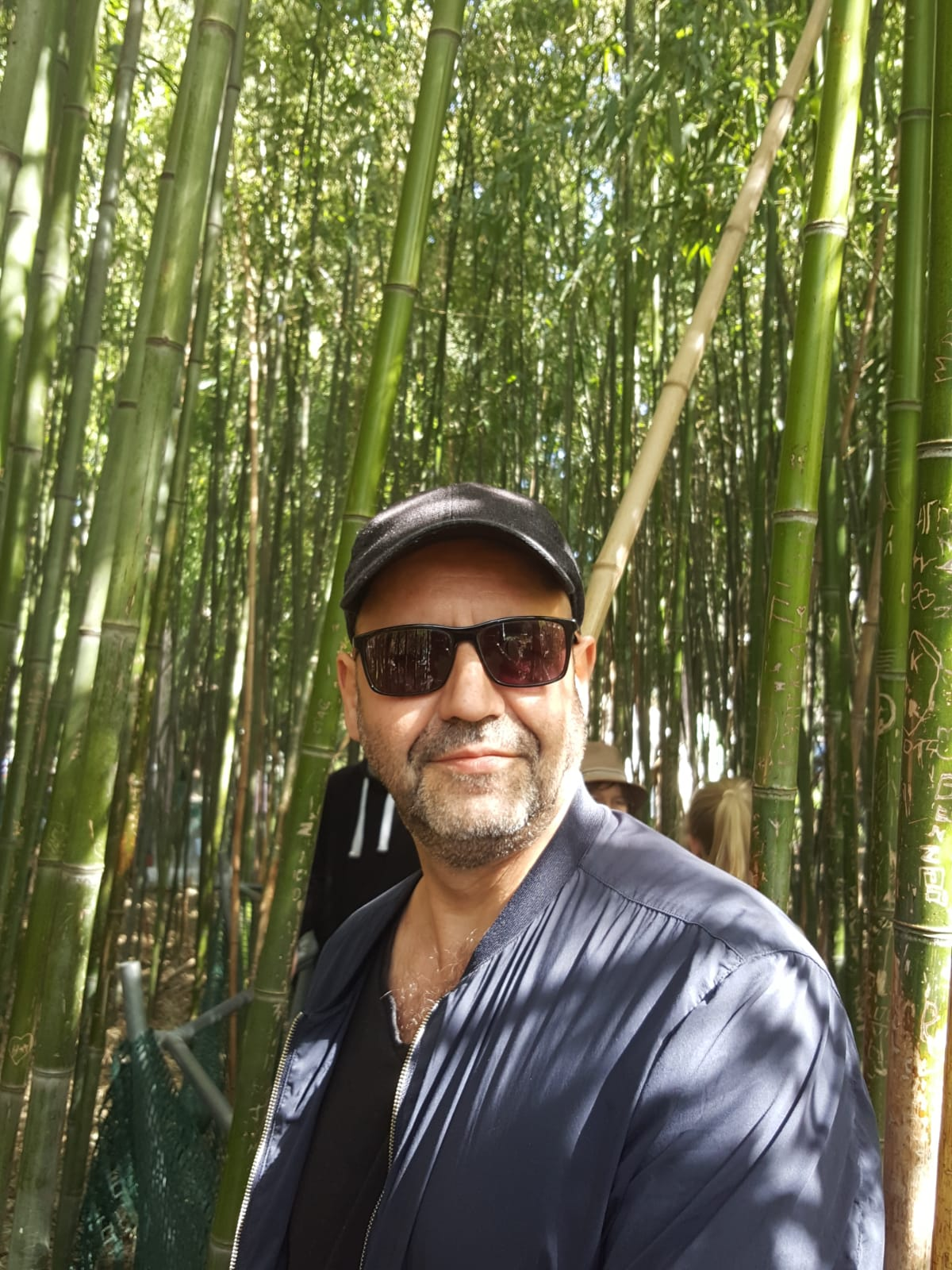 Stefan Bidner im botanischen Garten in Wien